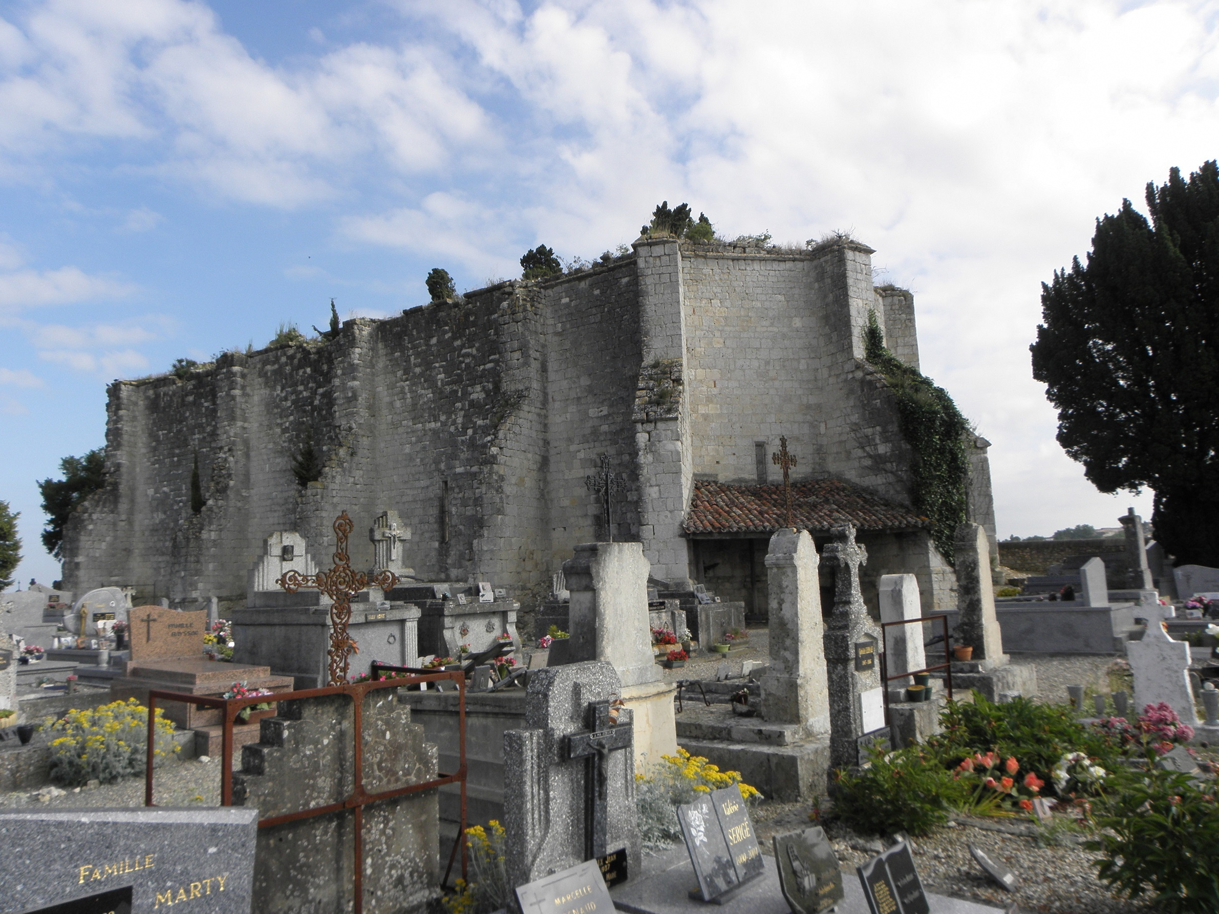 Église Saint-Pierre-de-Cazeaux, sise commune de Laplume (47=) chevet et flanc méridional.